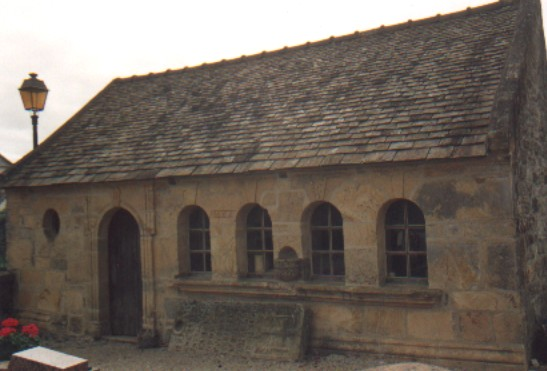 église Argol, ossuaire, denez goasguen.